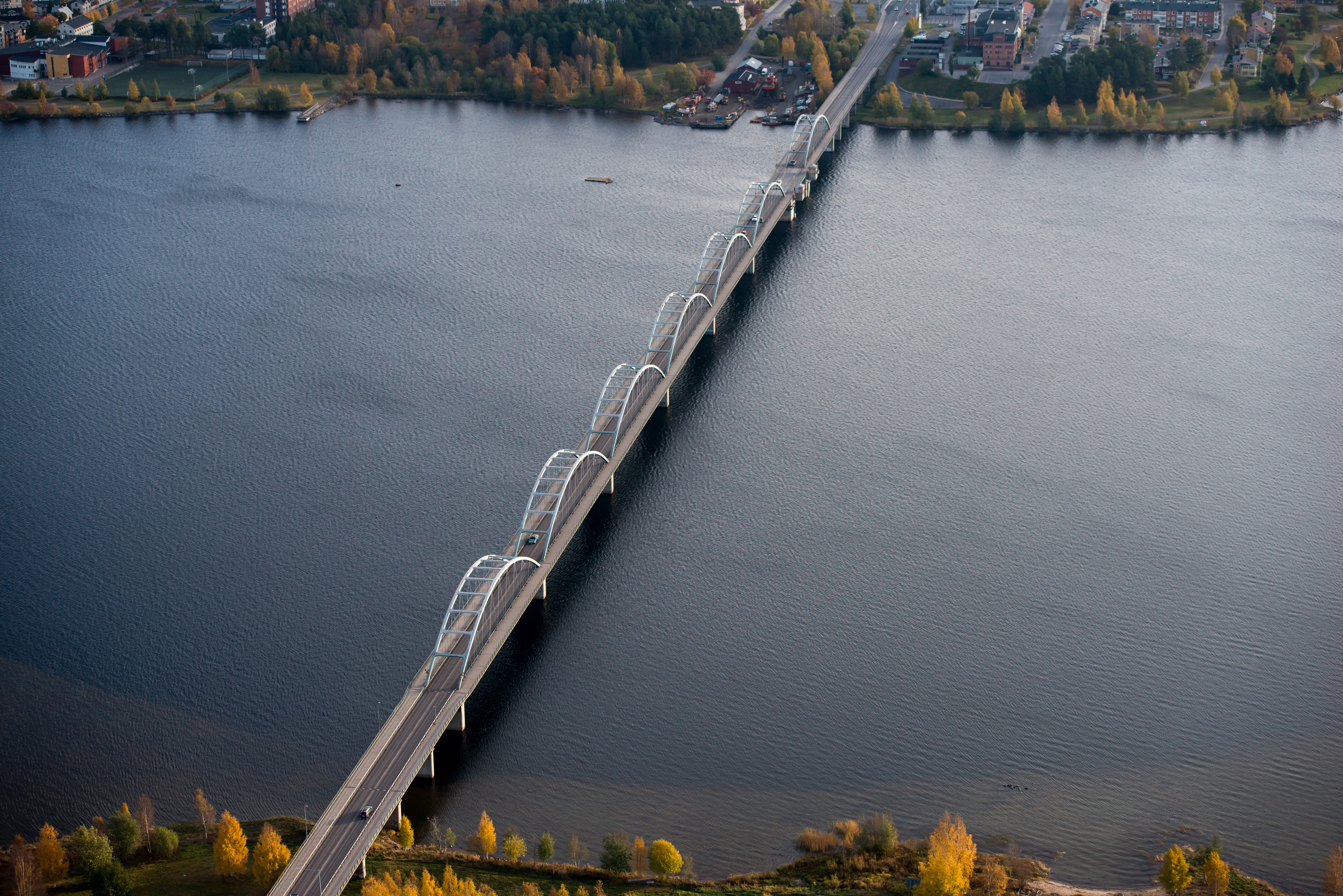 Bergnäsbron över Lule älv.